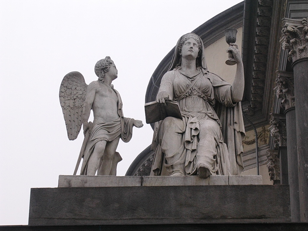 La statua della Fede col Graal, di fronte alla Chiesa della Gran Madre (Torino) Foto scattata dall'utente